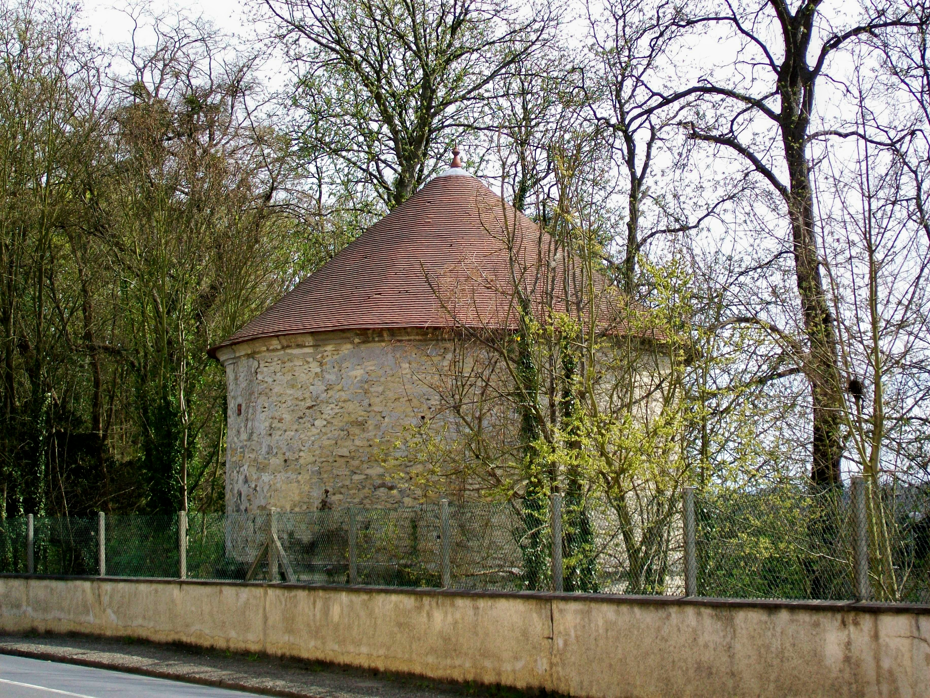 Le colombier du château, sur la D 922, presque aussi large que haut.